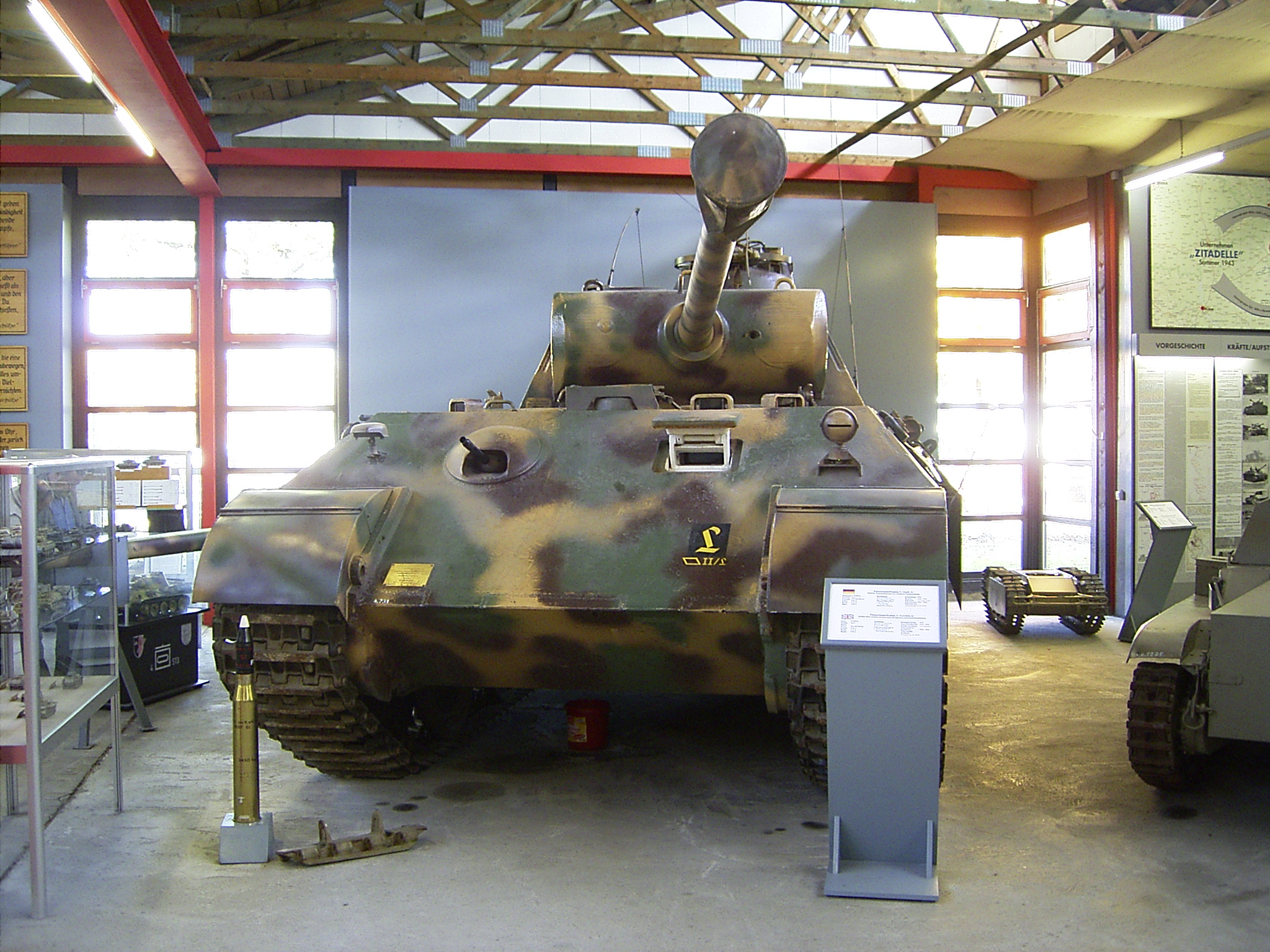 Panzer V (Panther) im Deutschen Panzermuseum Munster. Ausführung A umgerüstet als Panzerbefehlswagen mit erweiterter Funkausstattung.